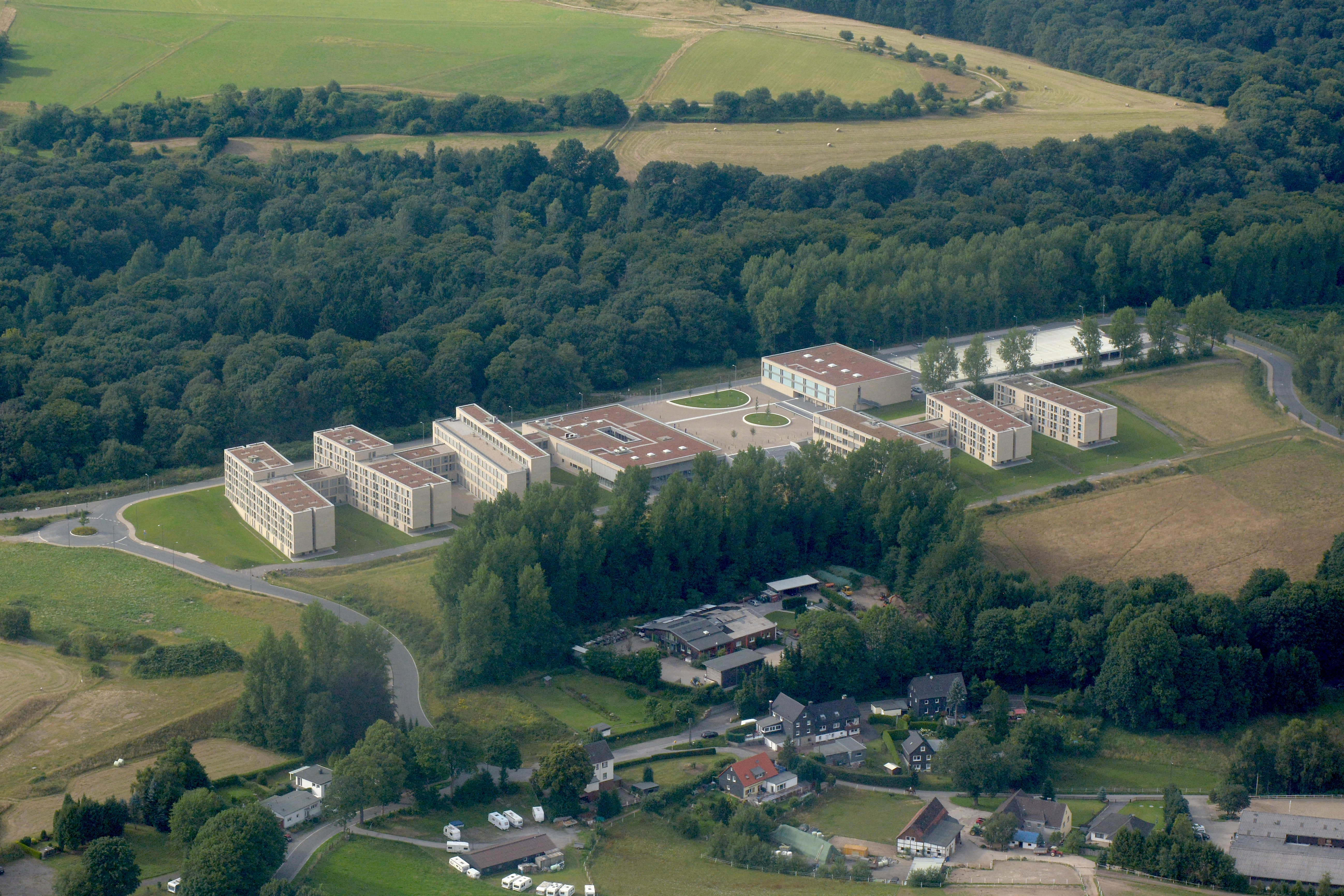 Justizvollzugsschule und Landesfinanzschulle Nordrhein-Westfalen in Wuppertal-Ronsdorf